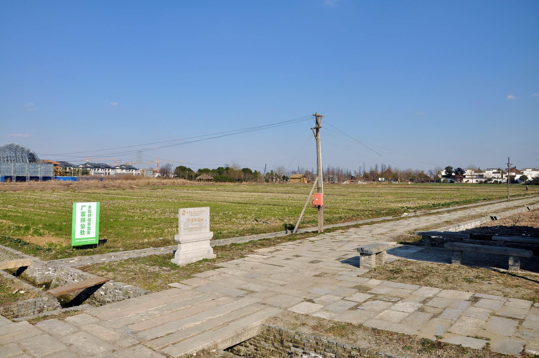 广富林遗址 松江区广富林村 新石器时代、东周